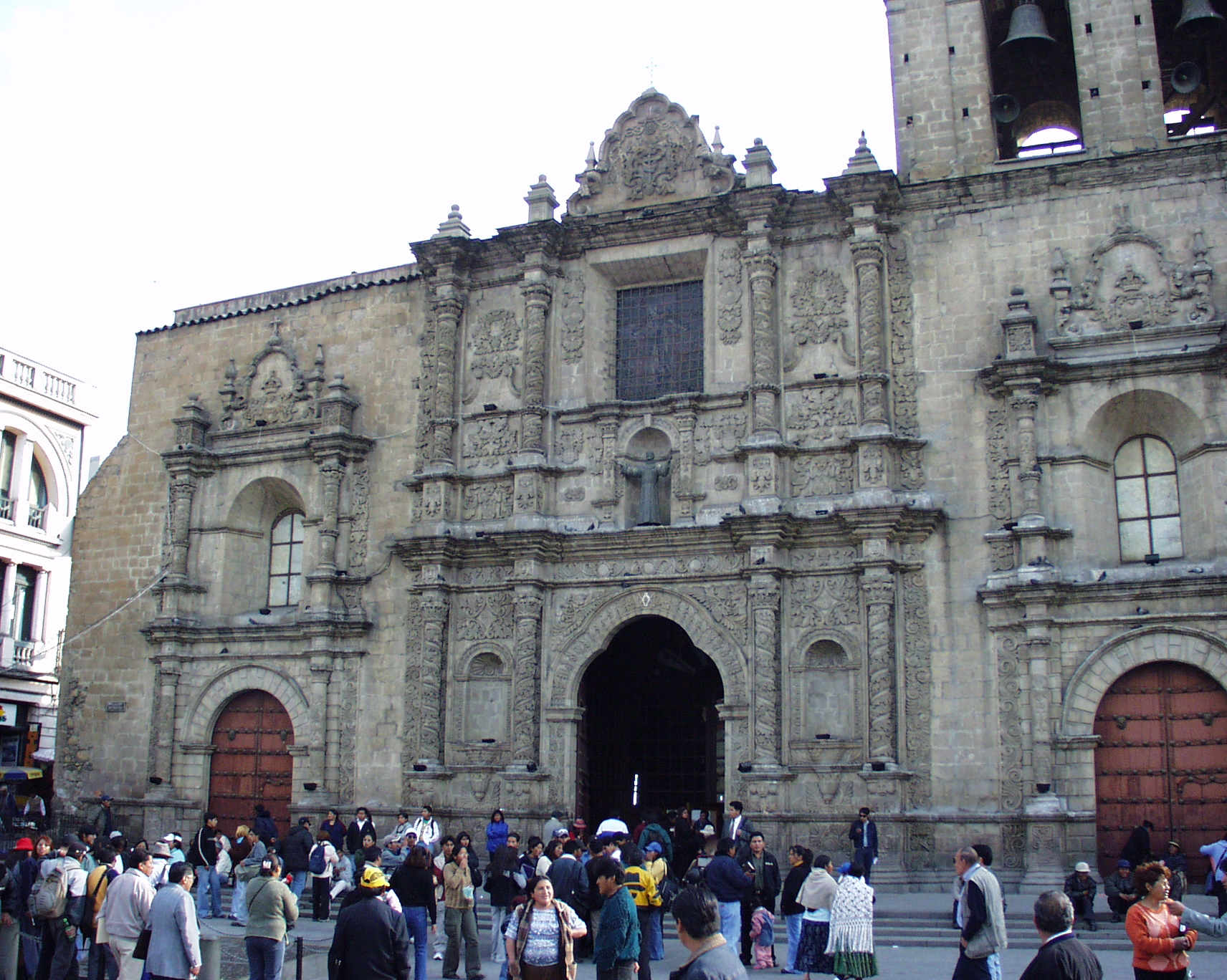 La Paz,Bolivia